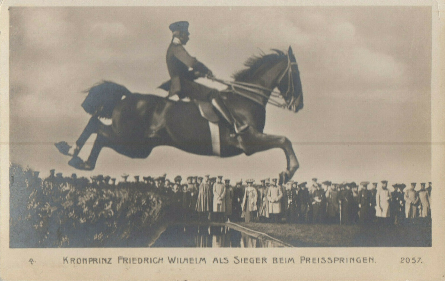 Wilhelm Kronprinz, 1904